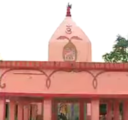 নাট মন্দির